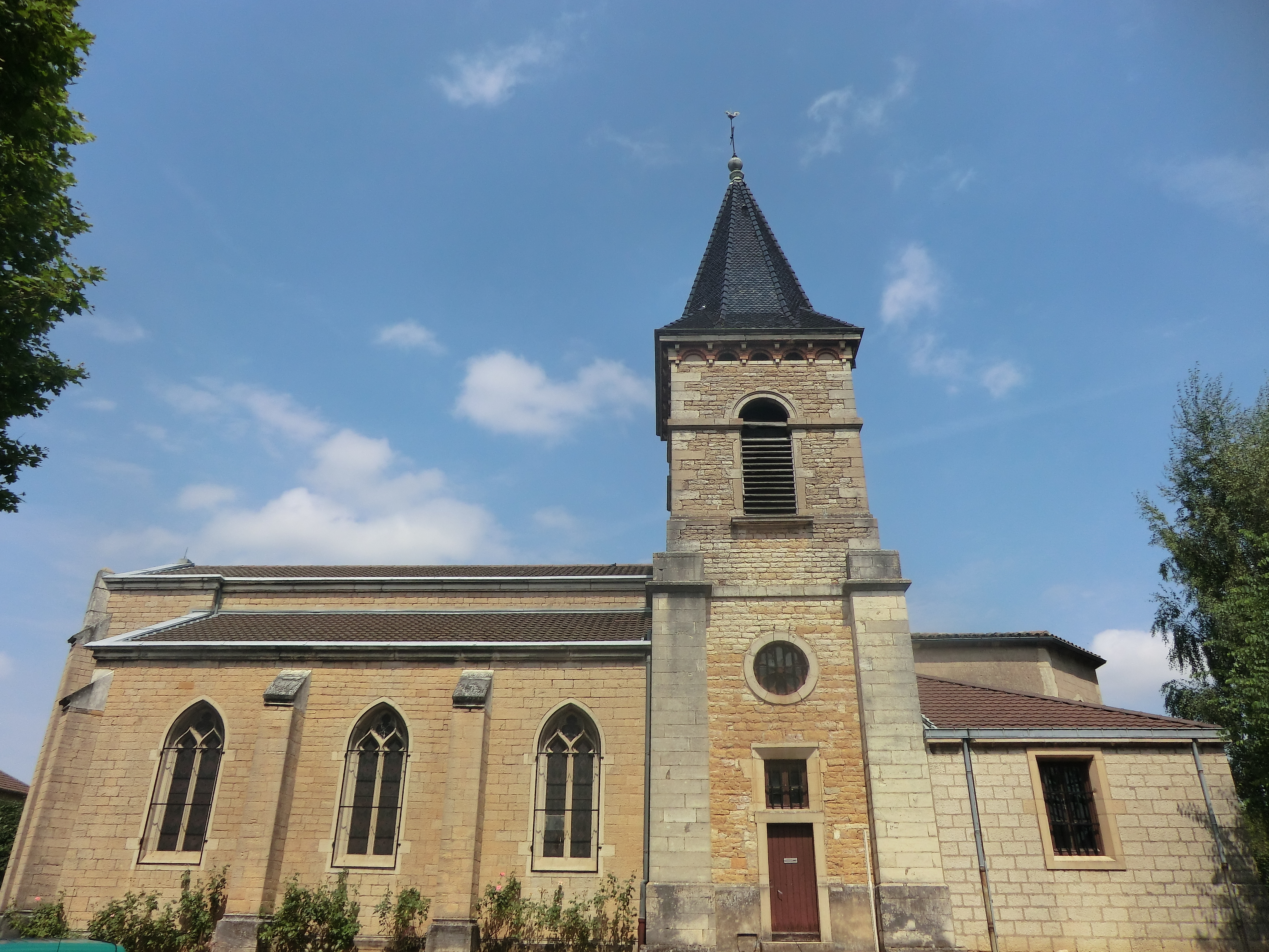 Église de Misérieux.